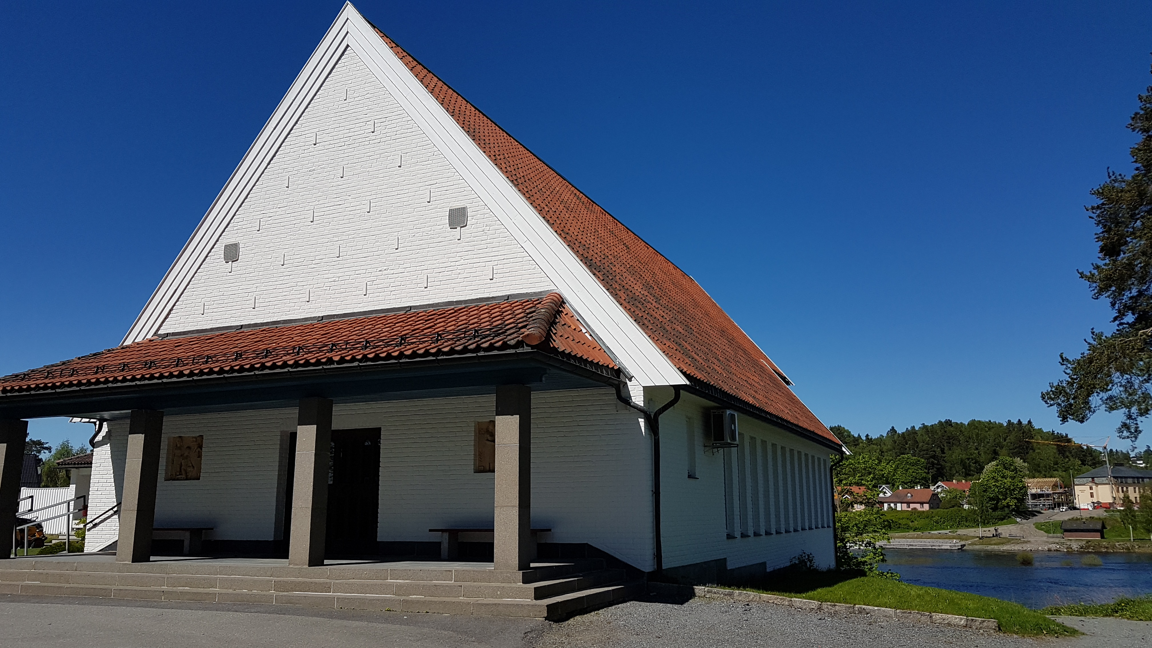 Ringerike krematorium i Hønefoss, Ringerike kommune